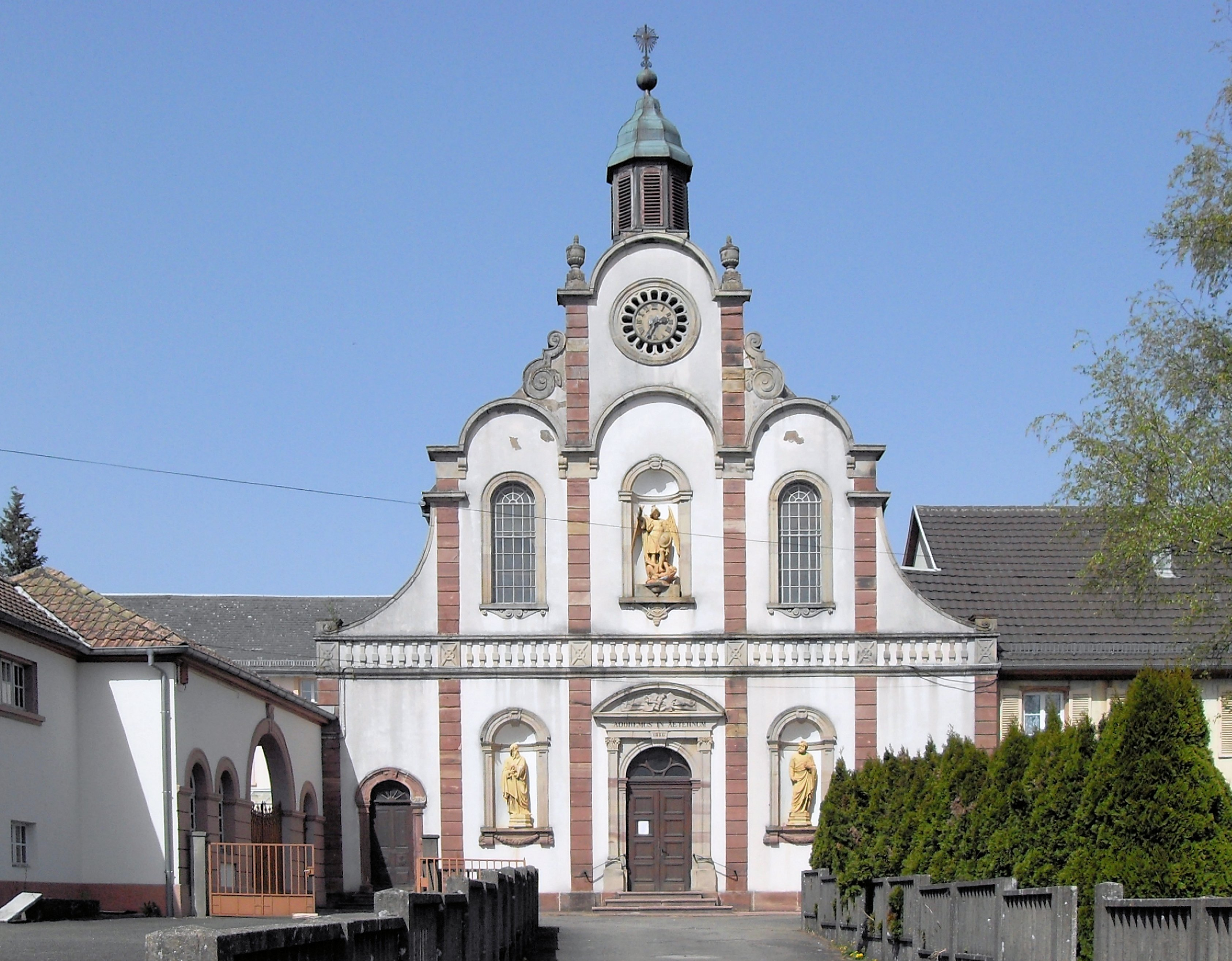 Eglise St-Joseph du couvent des Bénédictines-adoratrices à Bellemagny